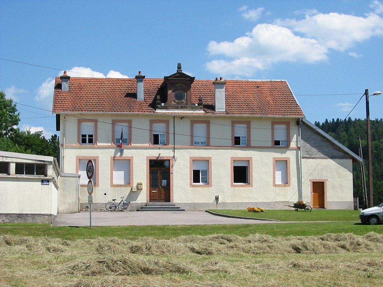 La mairie de Barbey-Seroux, commune des Vosges.